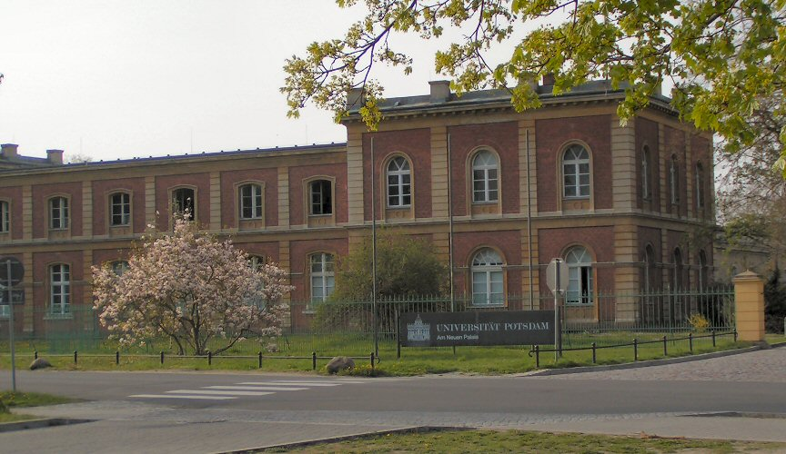 Universität Potsdam - Am Neuen Palais selbst erstellt am 22.4.2004 David Herrmann GNU Freie Dokumentationslizenz